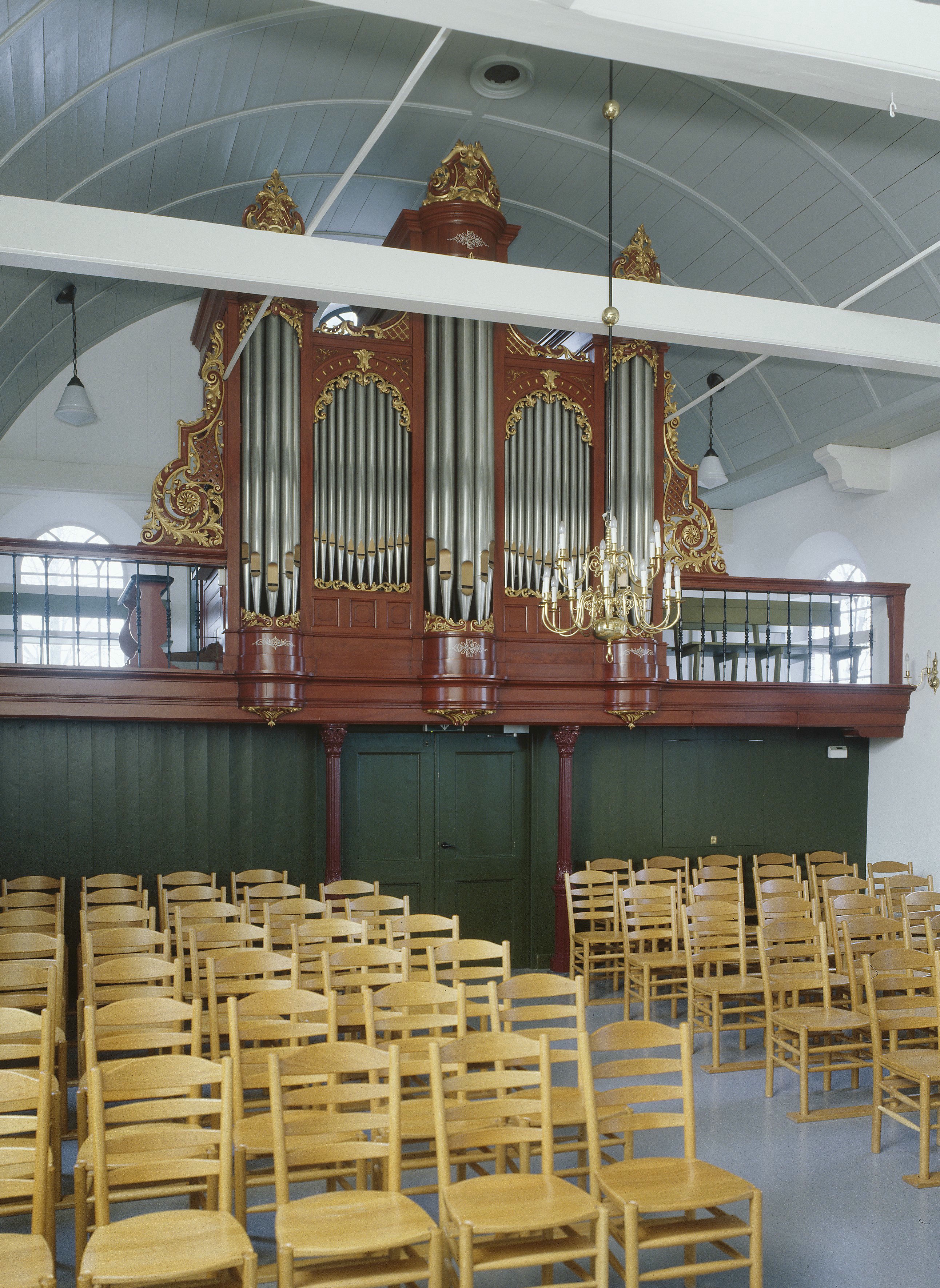 Nederlands Hervormde Kerk: Interieur, aanzicht orgel, orgelnummer 1332 (opmerking: Gefotografeerd voor Het Historische Orgel in Nederland 1878-1886, Bladzijde 184)